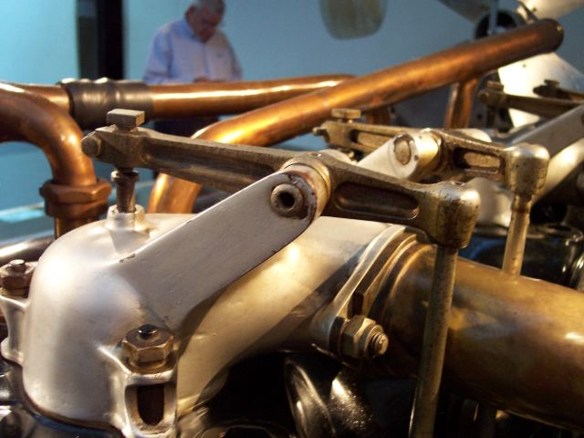 Kippehebel an einem alten Luftschiffmotor